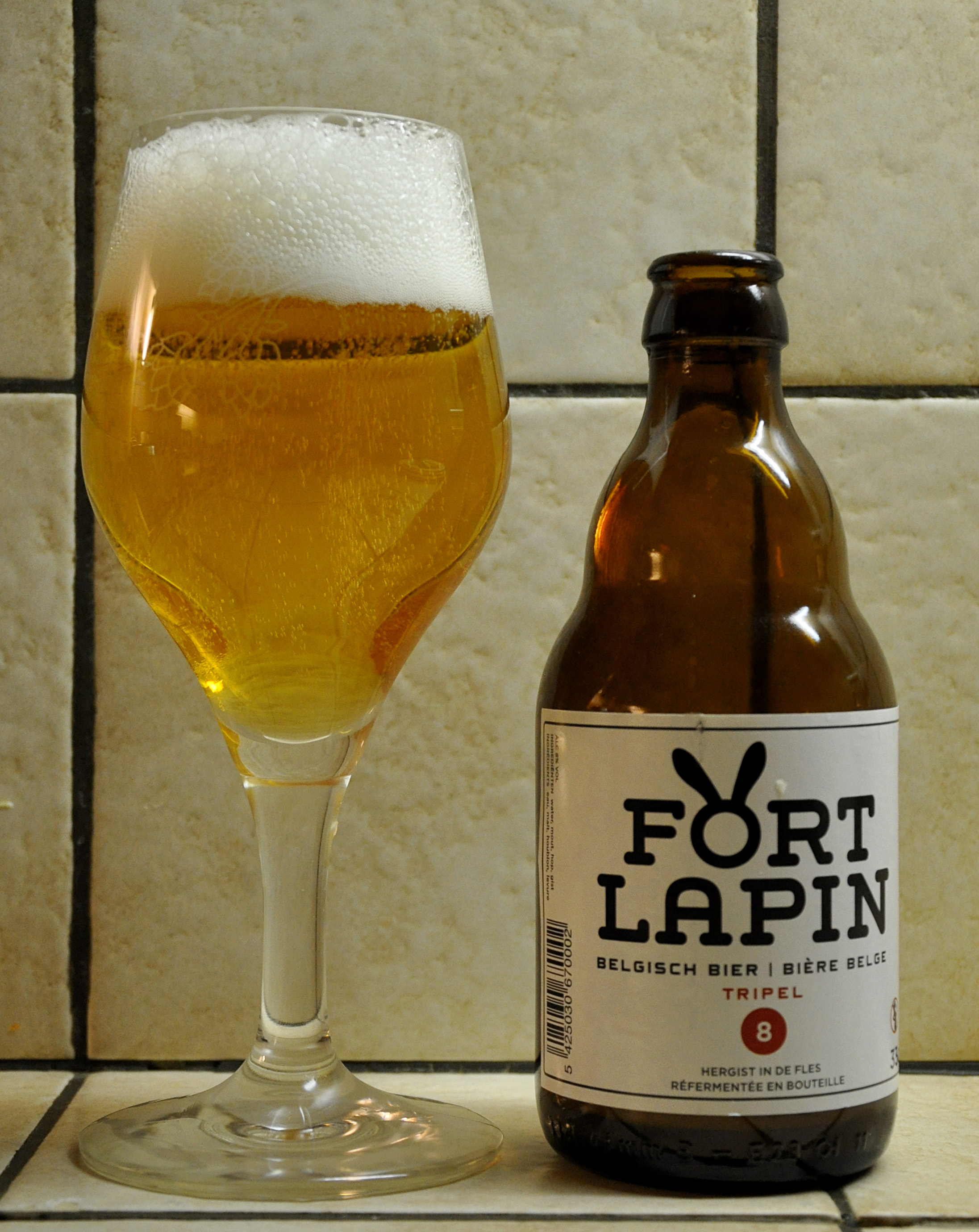 Fort Lapin 8